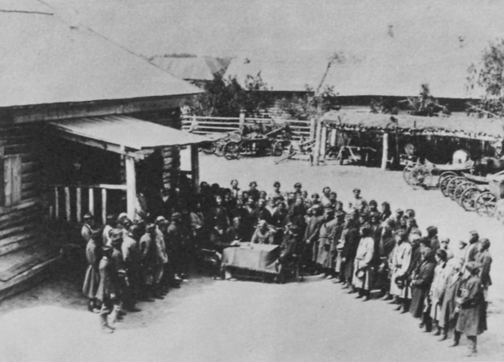 Russischer Photograph: Eine Wolost-(Gemeinde-) Versammlung